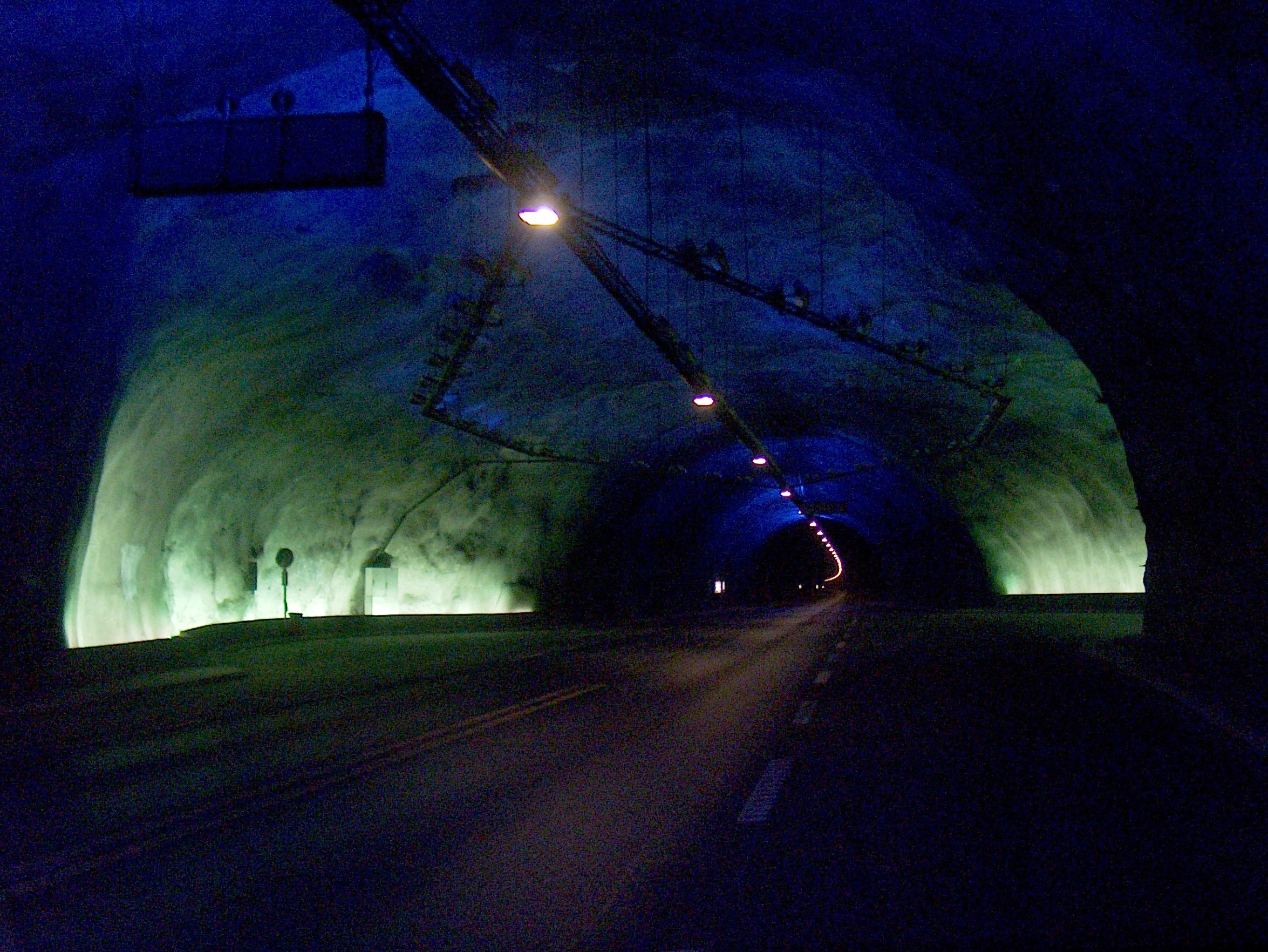 Lærdalstunnelen between Aurland and Lærdal in Norway